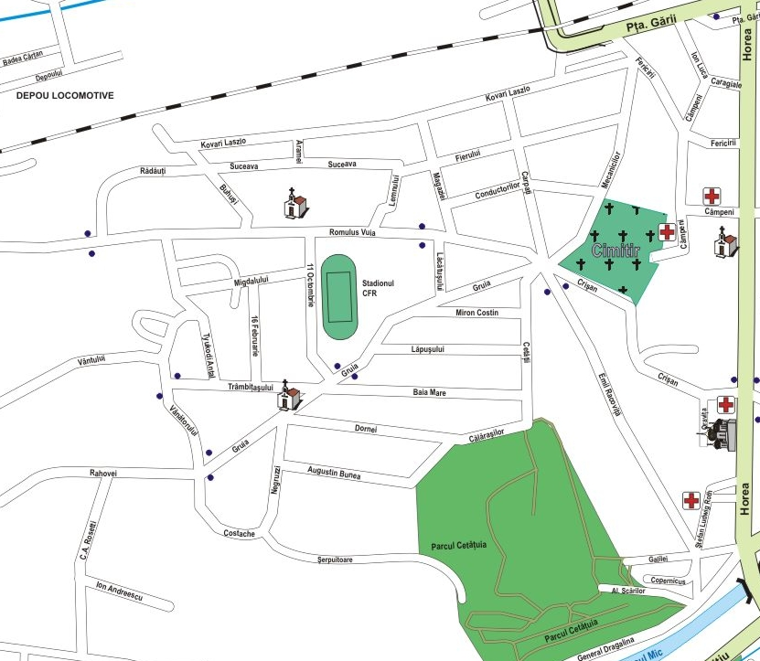 Harta Cartier Gruia, Cluj-Napoca